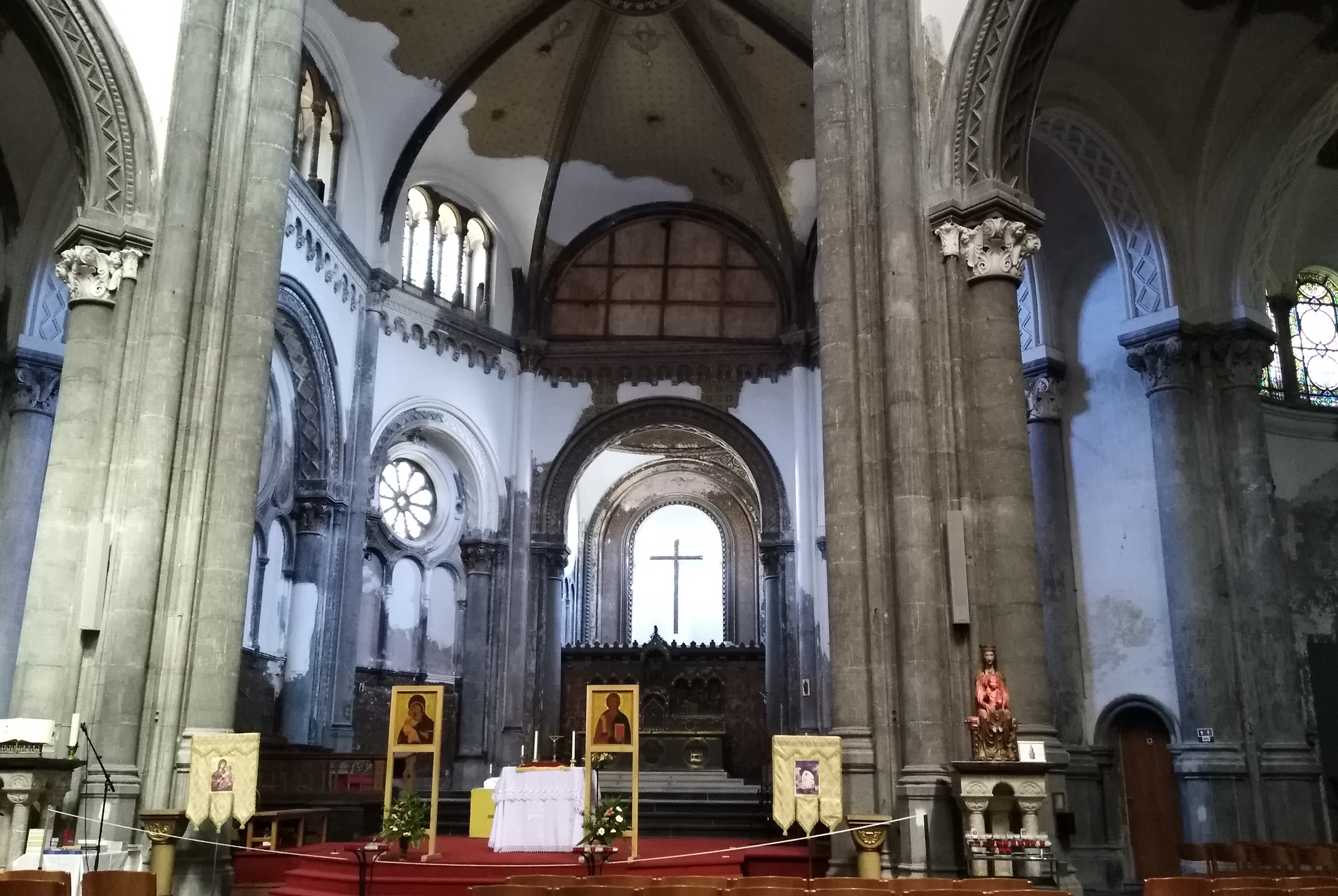 Marienkirche_Brüssel_Altarraum